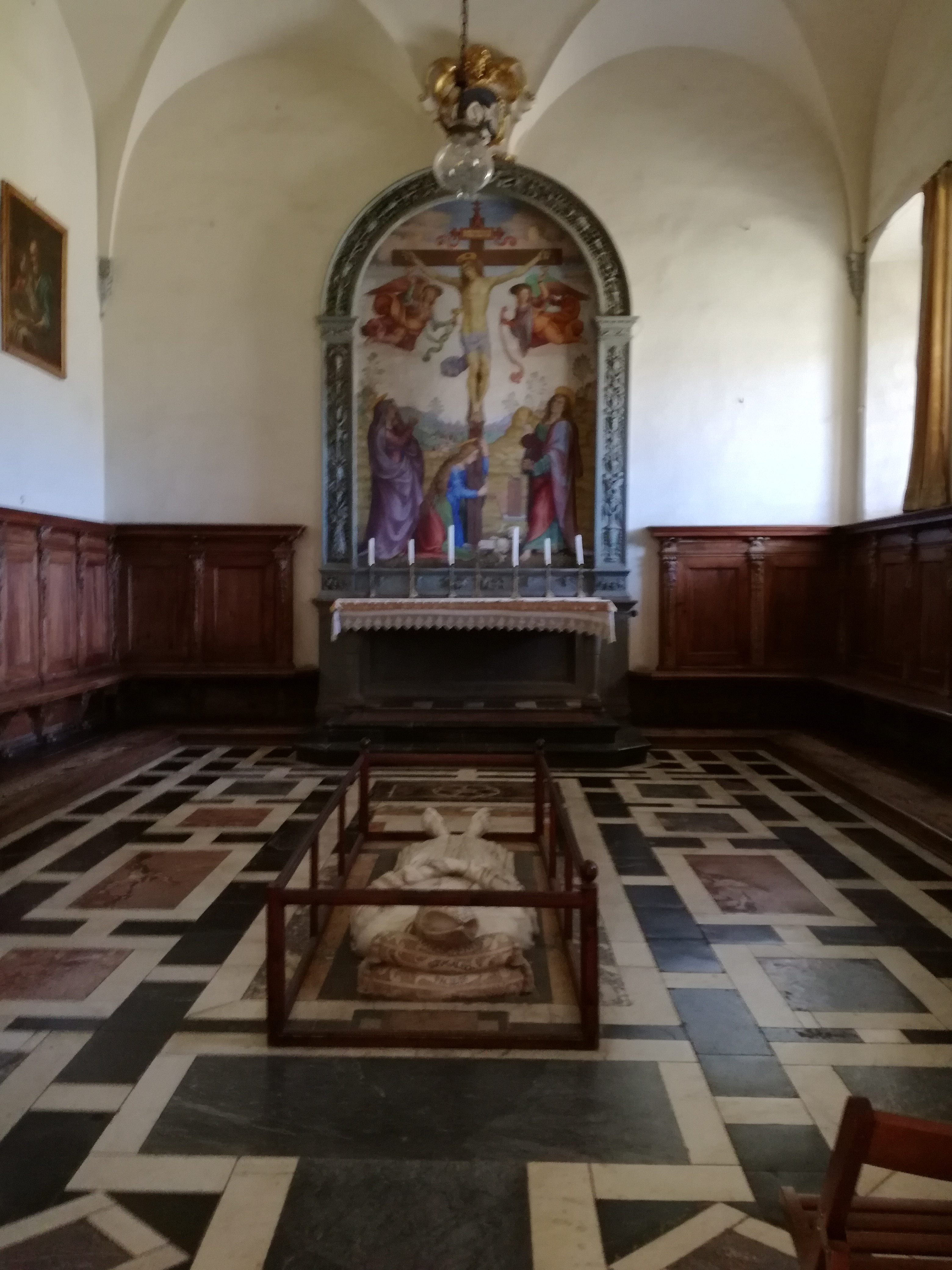 sala del capitolo della certosa di Firenze